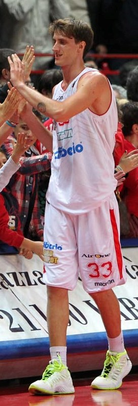 Achille Polonara